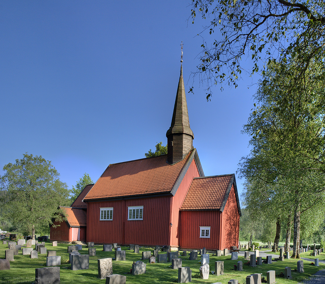 Vuku Kirke, Verdal